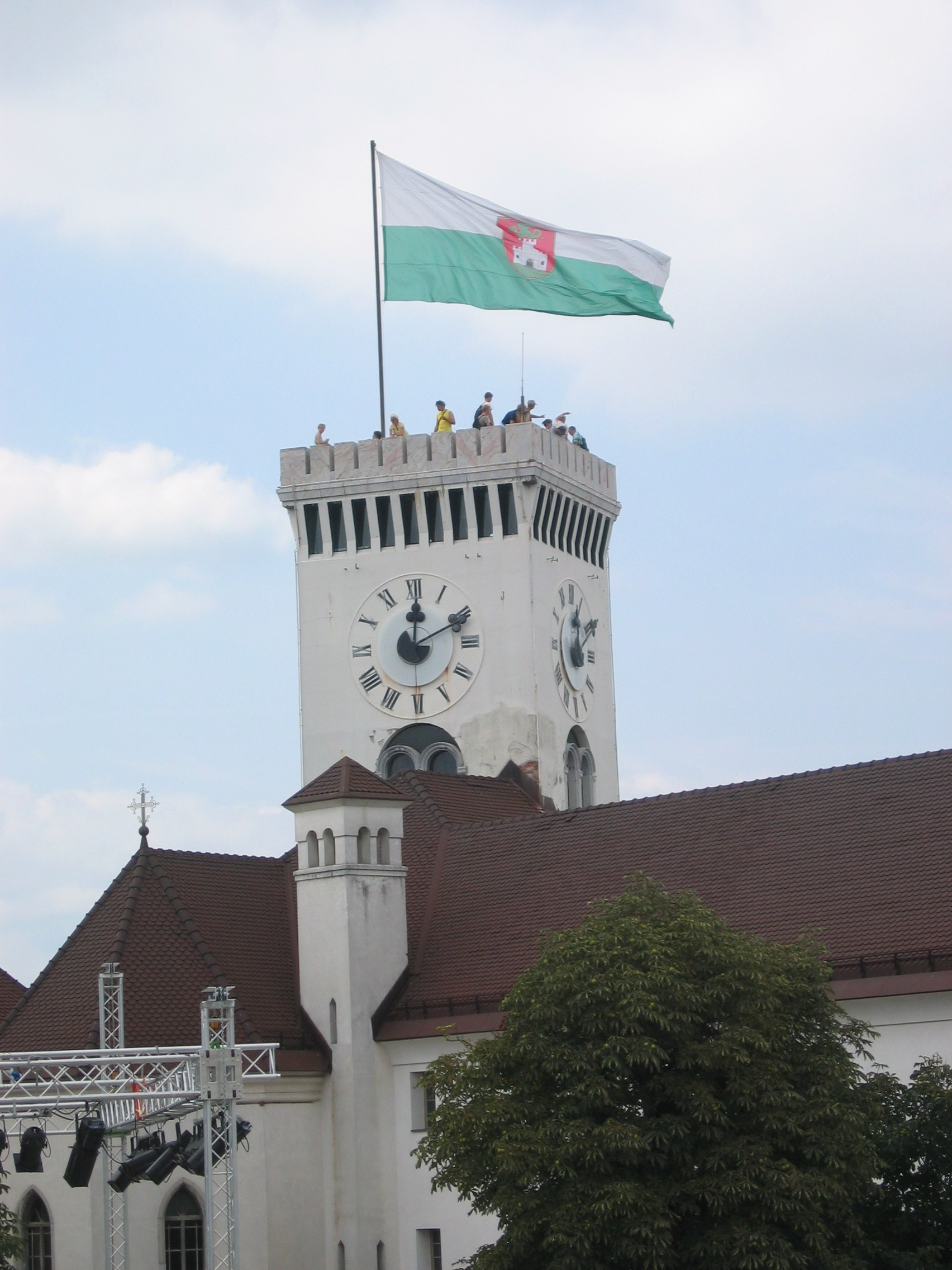 Ljubljana castle-tower (with flag of Ljubljana) photo:Ziga 13:37, 30 April 2006 (UTC)